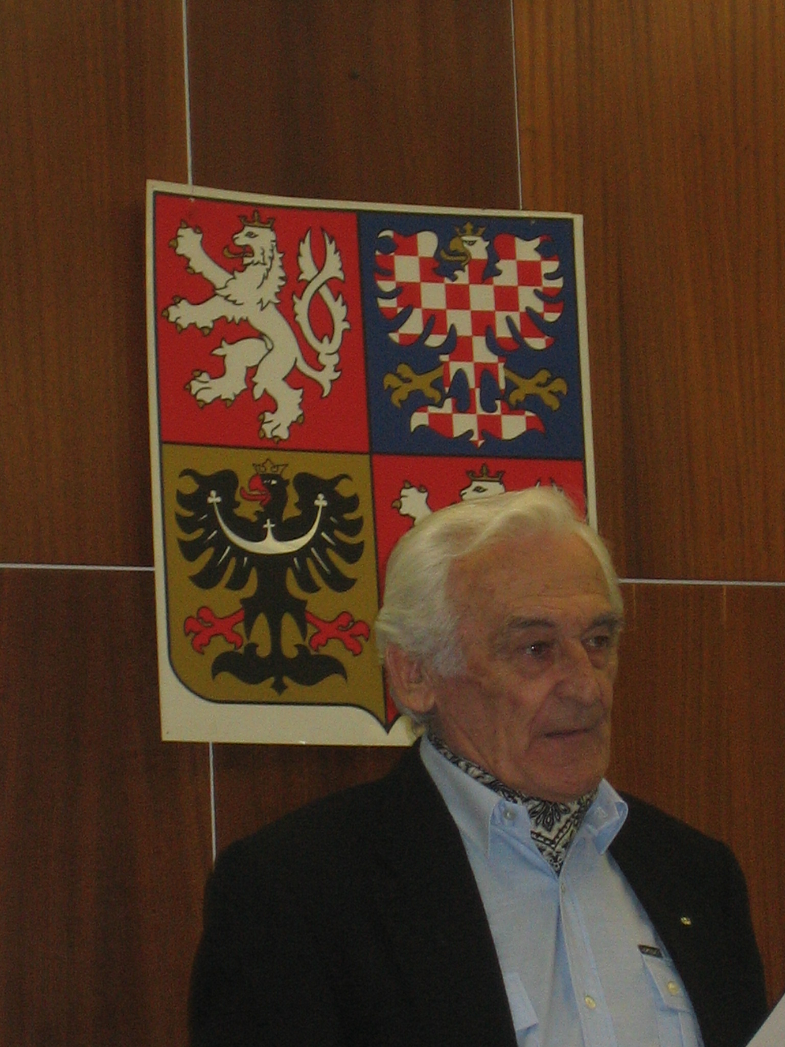 Milan Paumer